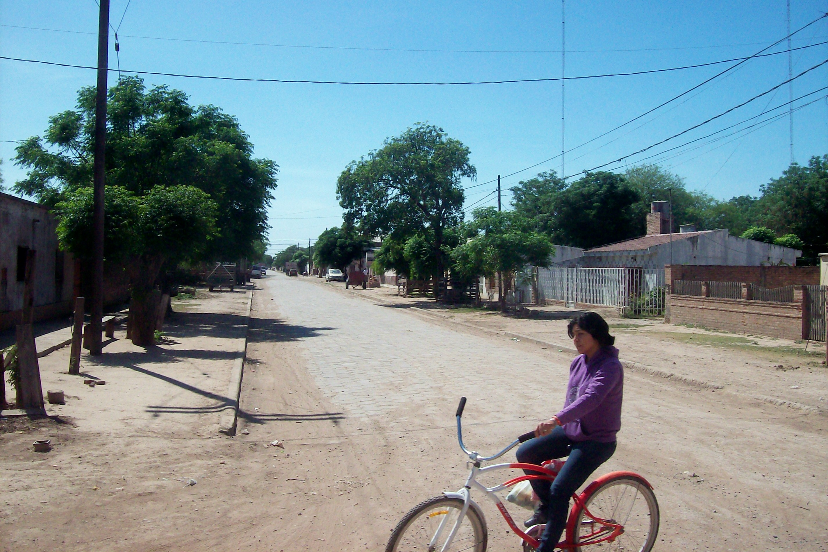 Campo Gallo, Alberdi, Santiago del Estero, República Argentina.